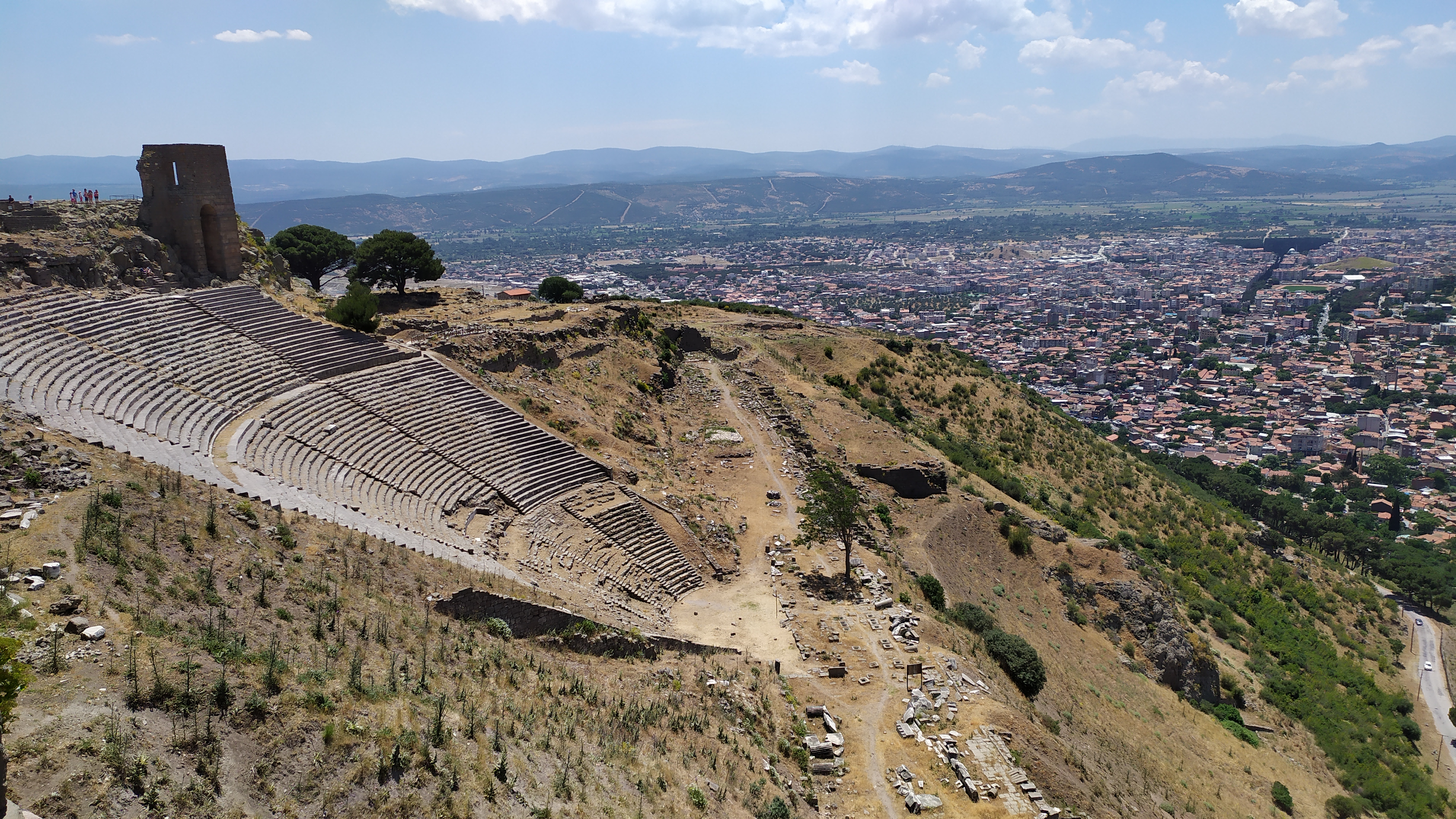 Bergama büyük antik tiyatro.